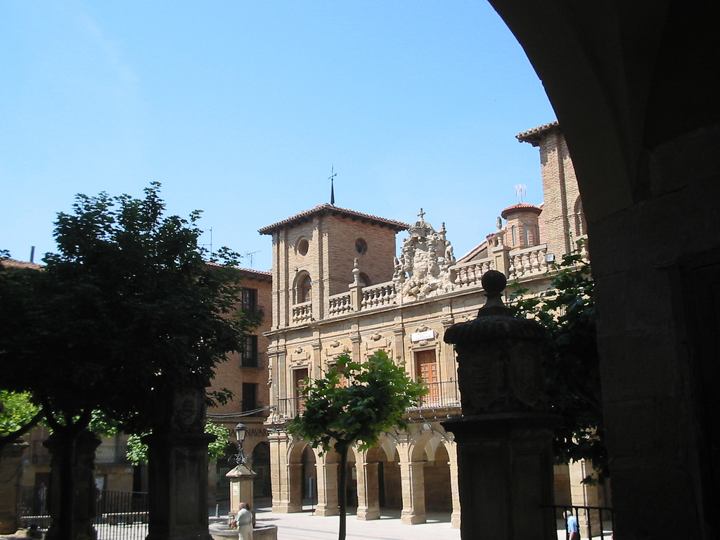 Ayuntamiento de Viana